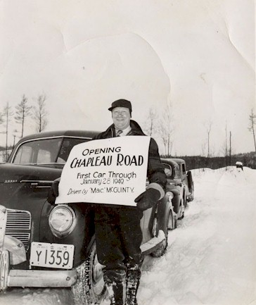 Mac McGuinty T.J. Godfrey